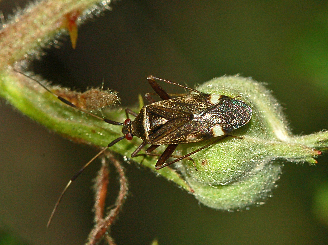 Closterotomus biclavatus at Piani di Praglia, Genova, Italy